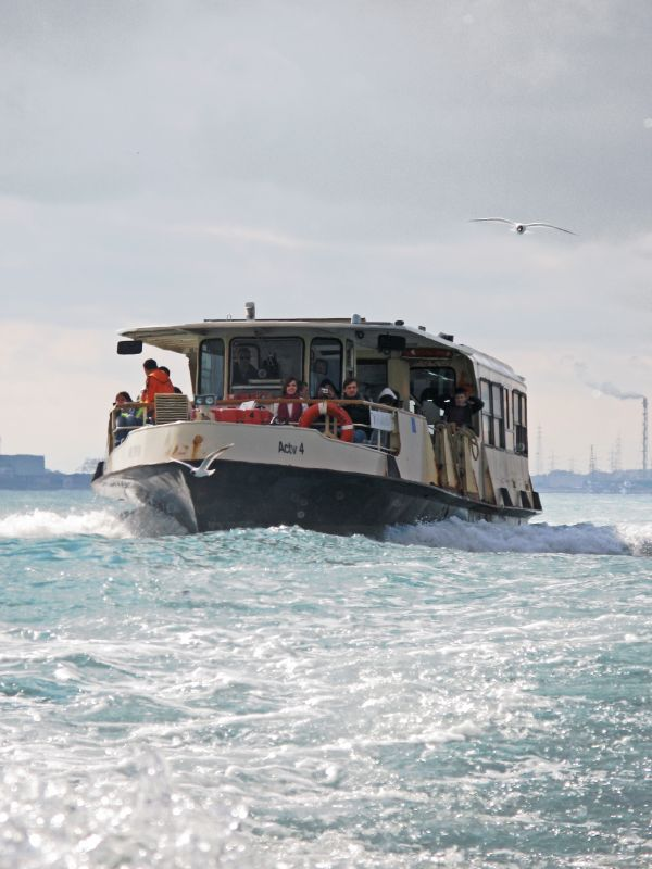 Vaporetto nella Laguna Veneta.